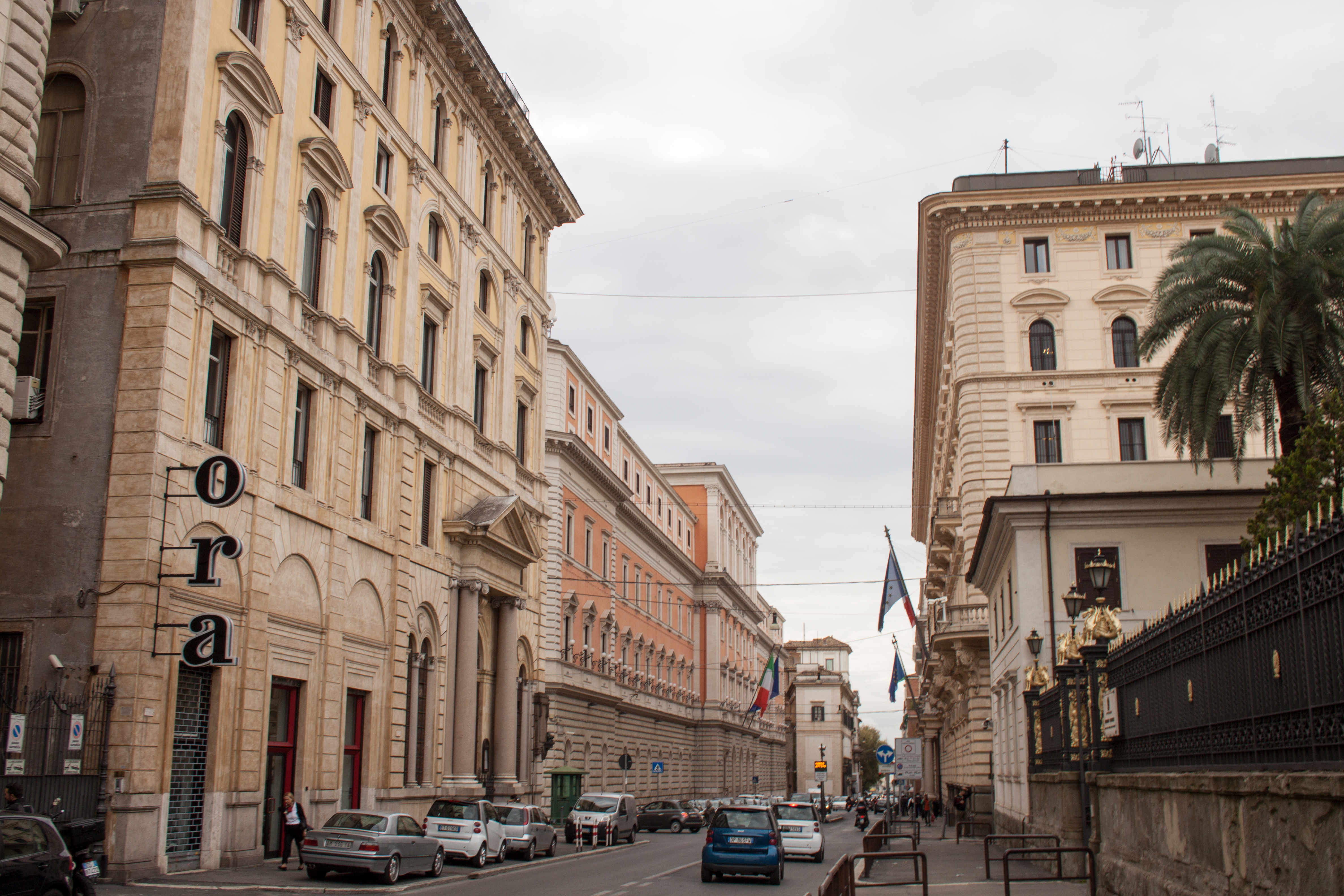 Via XX Settembre from Piazza San Bernardolabel QS:Len,"Via XX Settembre from Piazza San Bernardo"label QS:Lhu,"A Via XX Settembre a Piazza San Bernardo felől"